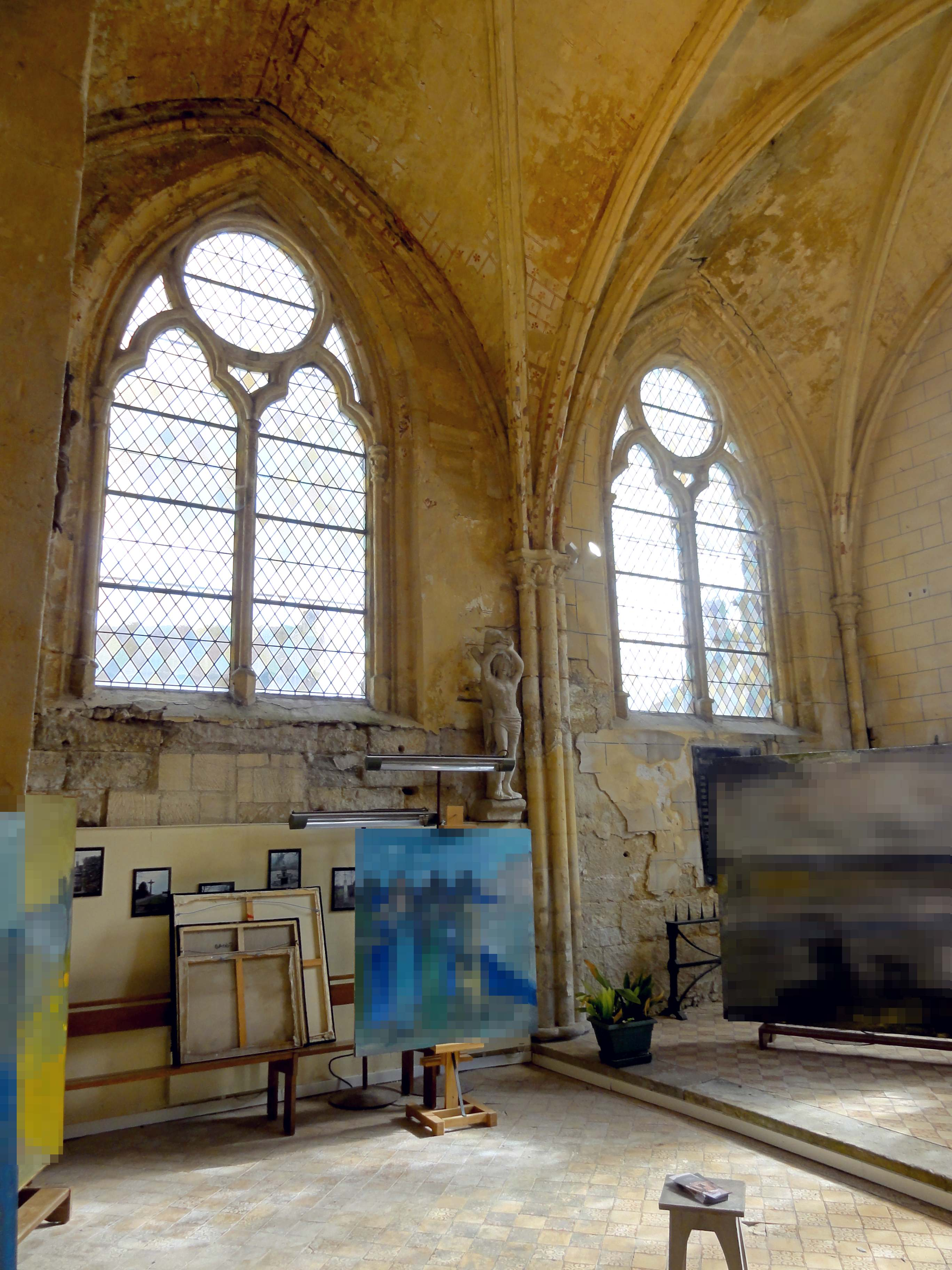 Intérieur de l'église - voir titre.